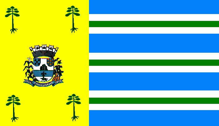 pinhalzinho-sp flag